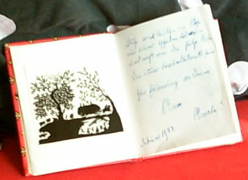 Poesiealbum 1977, selbst fotografiert (Scan wäre besser, aber...)